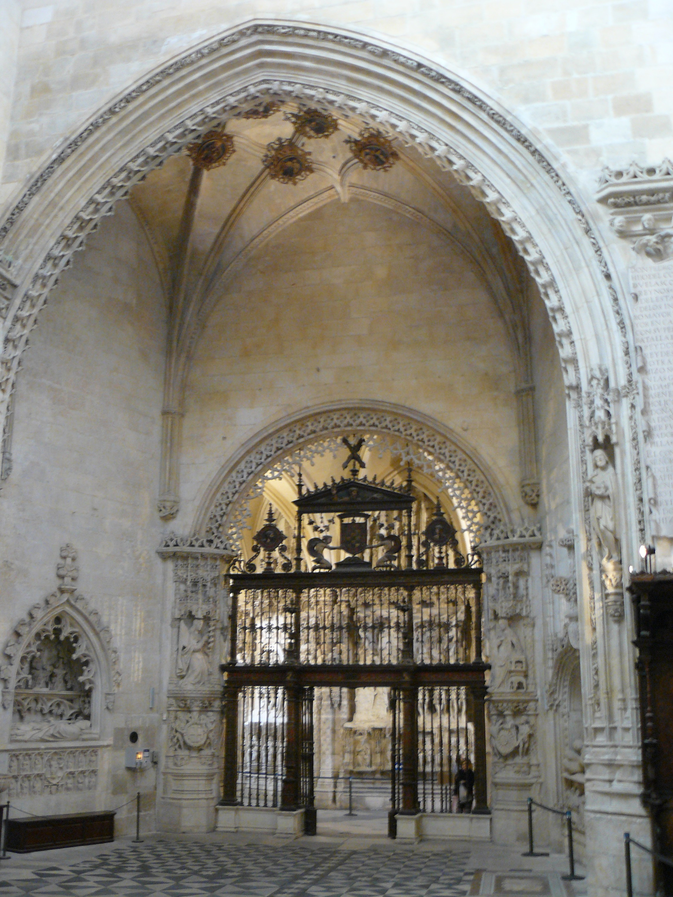 Catedral de Burgos, Burgos.